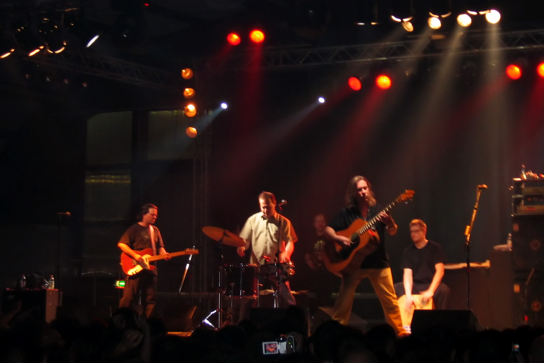 Violent Femmes in concert, 2006.